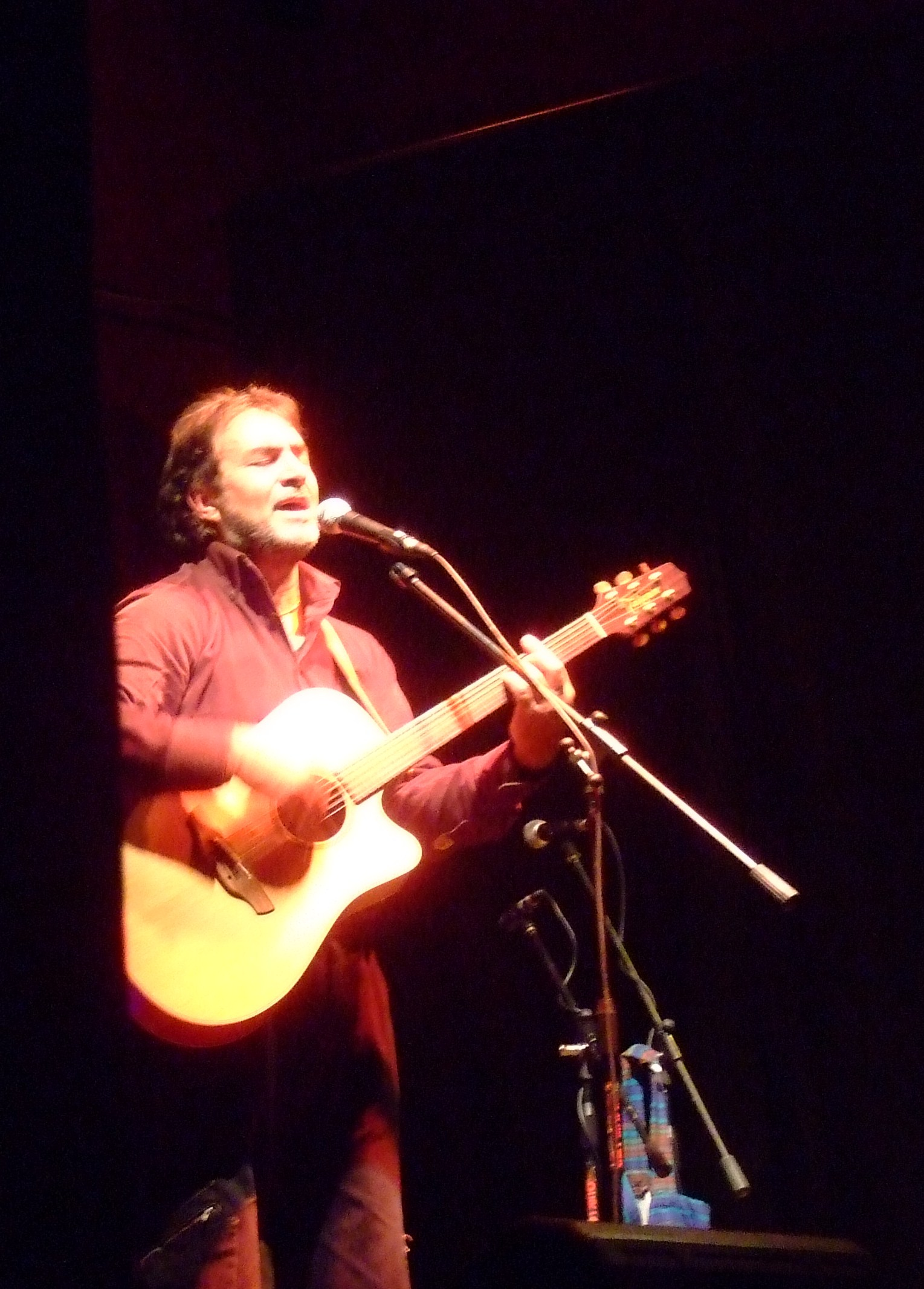 Carlo Muratori si esibisce nella sede della Associazione Culturale Alan Lomax di Catania.